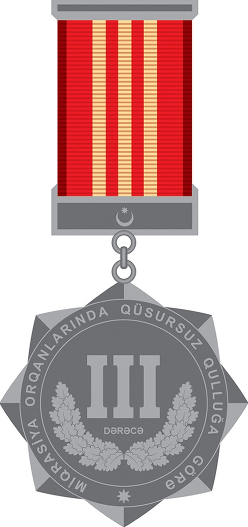 “Miqrasiya orqanlarında qüsursuz qulluğa görə” III dərəcəli Azərbaycan Respublikası medalı